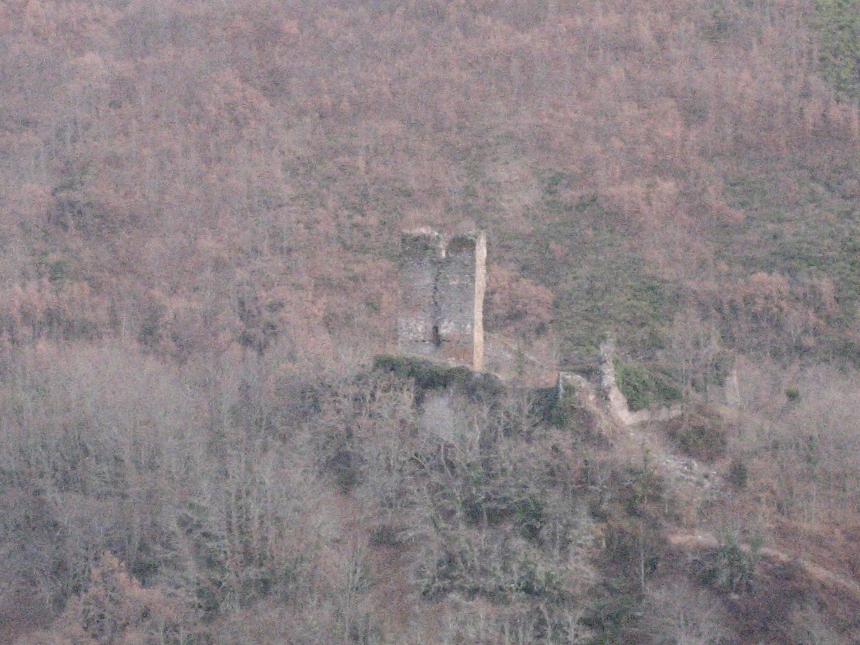 Castillo de Balboa. Balboa (El Bierzo, León, España)